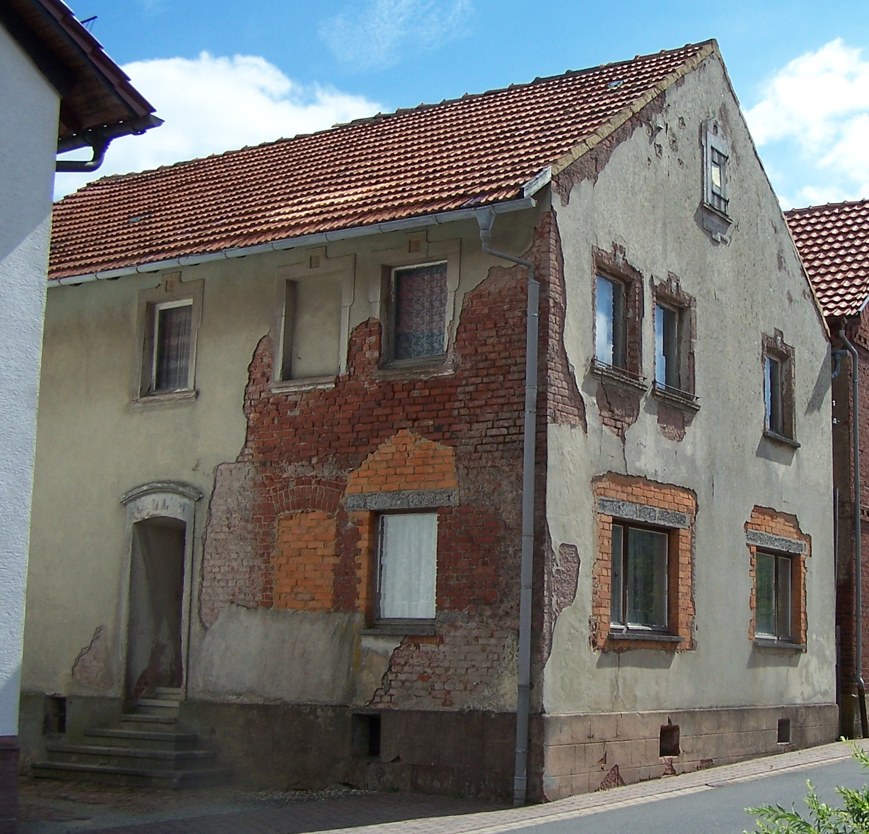 Dieses Wohnhaus wurde beim Gebirgsschlag von Völkershausen im Frühjahr 1989 schwer beschädigt. Die Ruine soll 2017 abgerissen werden.